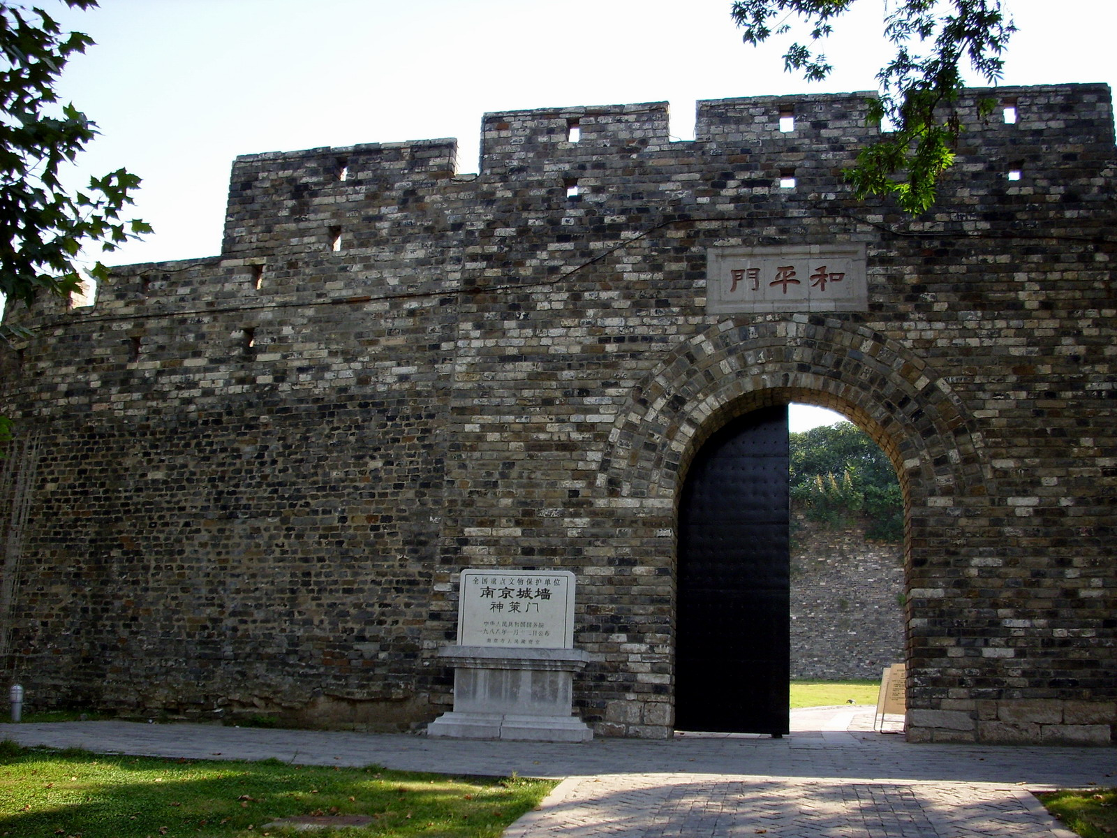 南京明城墙和平门（神策门）